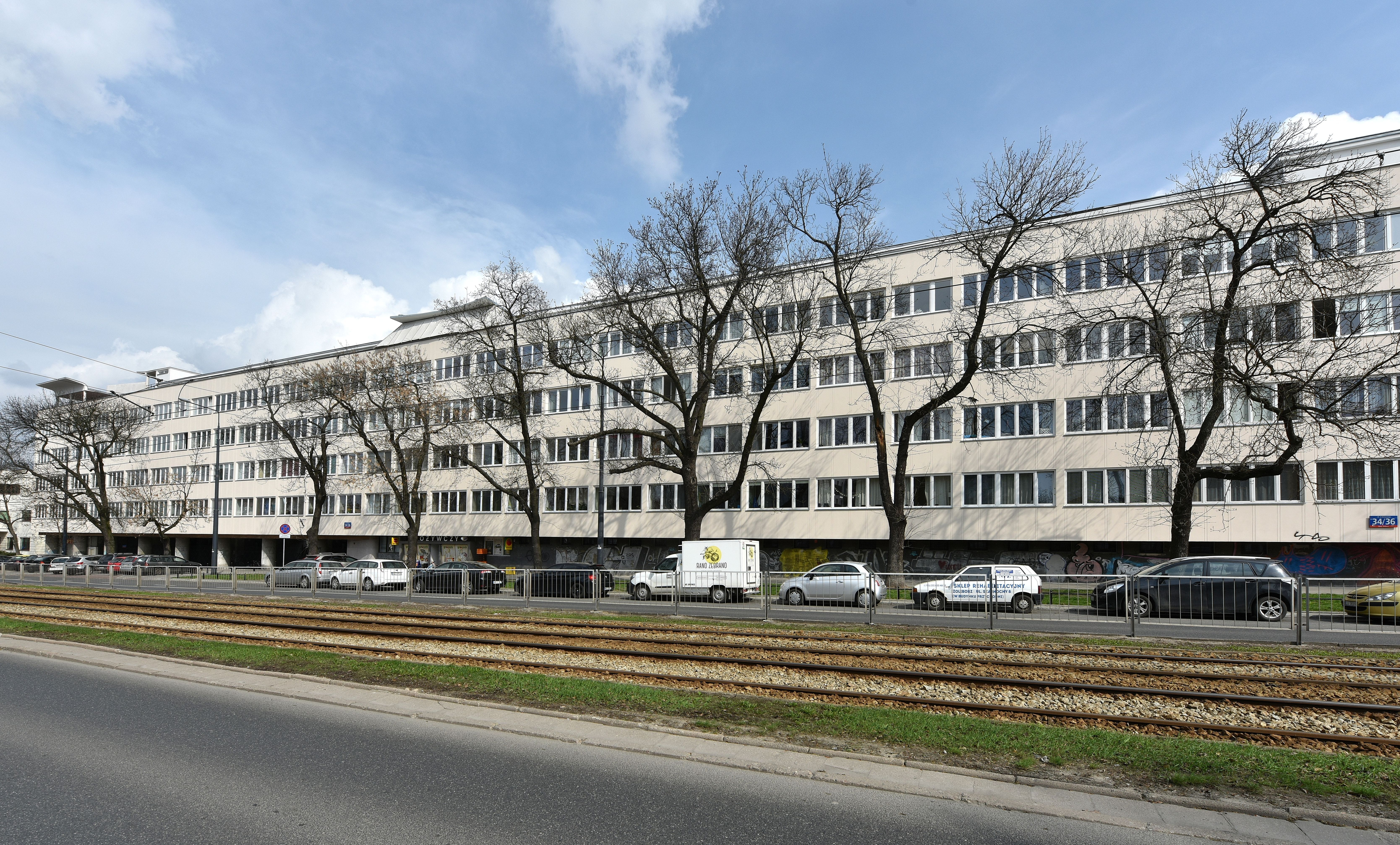 Szklany Dom (1938-1941) przy ul. Mickiewicza 34/36 w Warszawie, Polska. Przykład luksusowego modernizmu. Architekt Juliusz Żórawski stworzył budynek z mieszkaniami o powierzchni od 33 do 177m2 każde i z dużym tarasem widokowym na dachu.